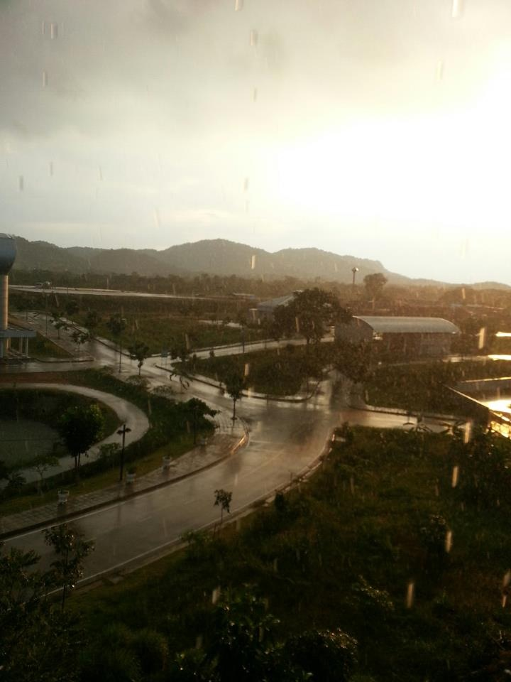 ฟ้าหลังฝนที่ศูนย์ฝึกกีฬาแห่งชาติมวกเหล็ก